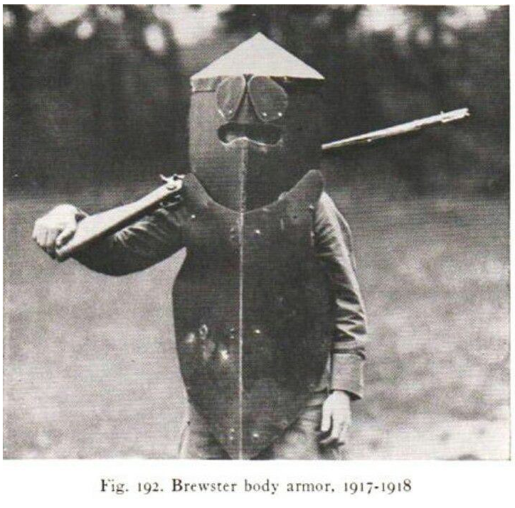 Брюстера броня бронежилет